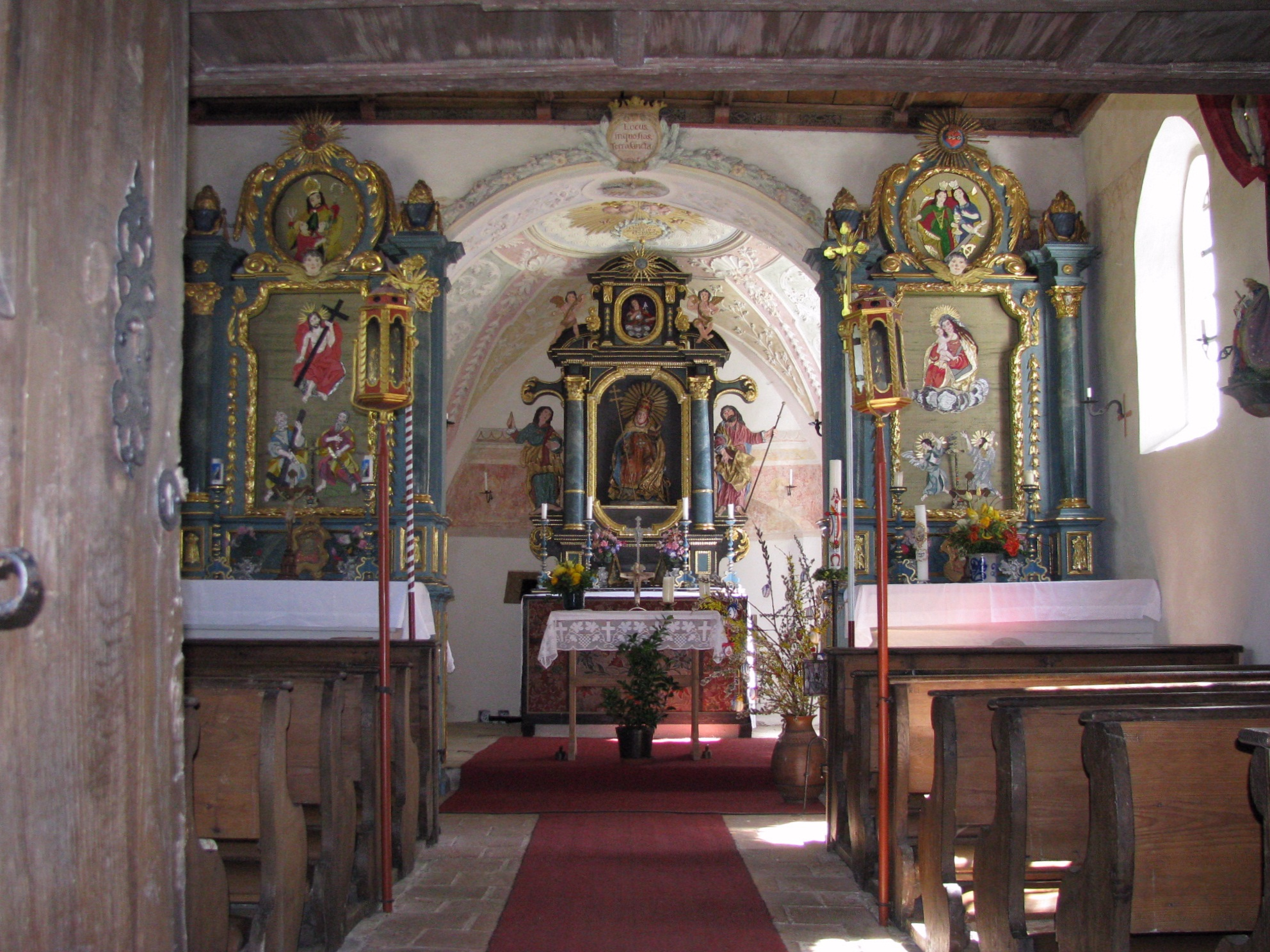 Innenraum der Filialkirche St. Clemens (Waldkapelle Oberberghausen), Landkreis Freising, Bayern